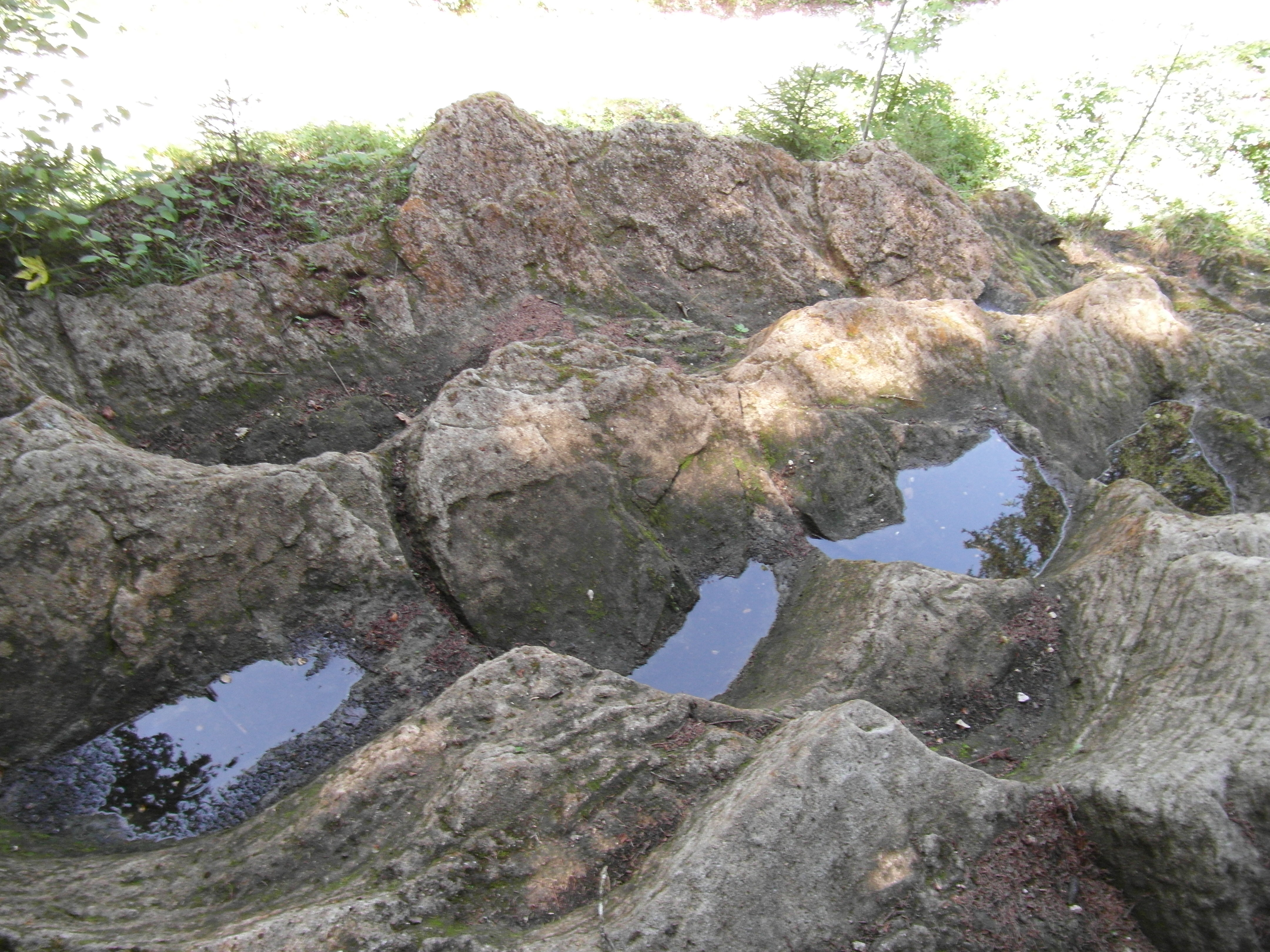 Carrière de meules des écouges en aout 2017